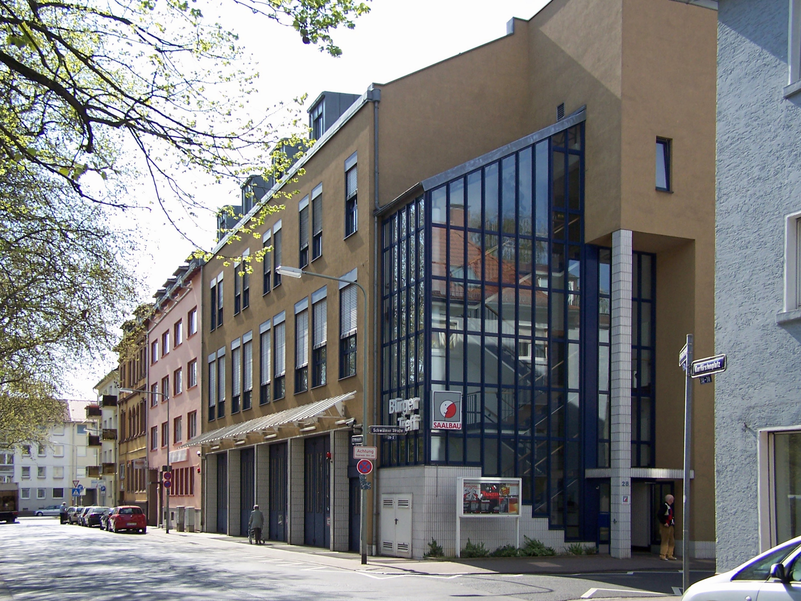 Bereichswache 2A der Frankfurter Berufsfeuerwehr, Hauptausfahrt im Bürgerhaus am Kurfürstenplatz. Der Einsatzbereich der Feuerwehr Frankfurt am Main für Bockenheim wurde später dem Standort der Feuerwache 2 im Gallusviertel, Heinrichstraße 2, zugeordnet. Die Schwälmer Straße 20, bzw. Kurfürdtenplatz, wurde dann von der Berufsfeuerwehr Frankfurt geräumt.